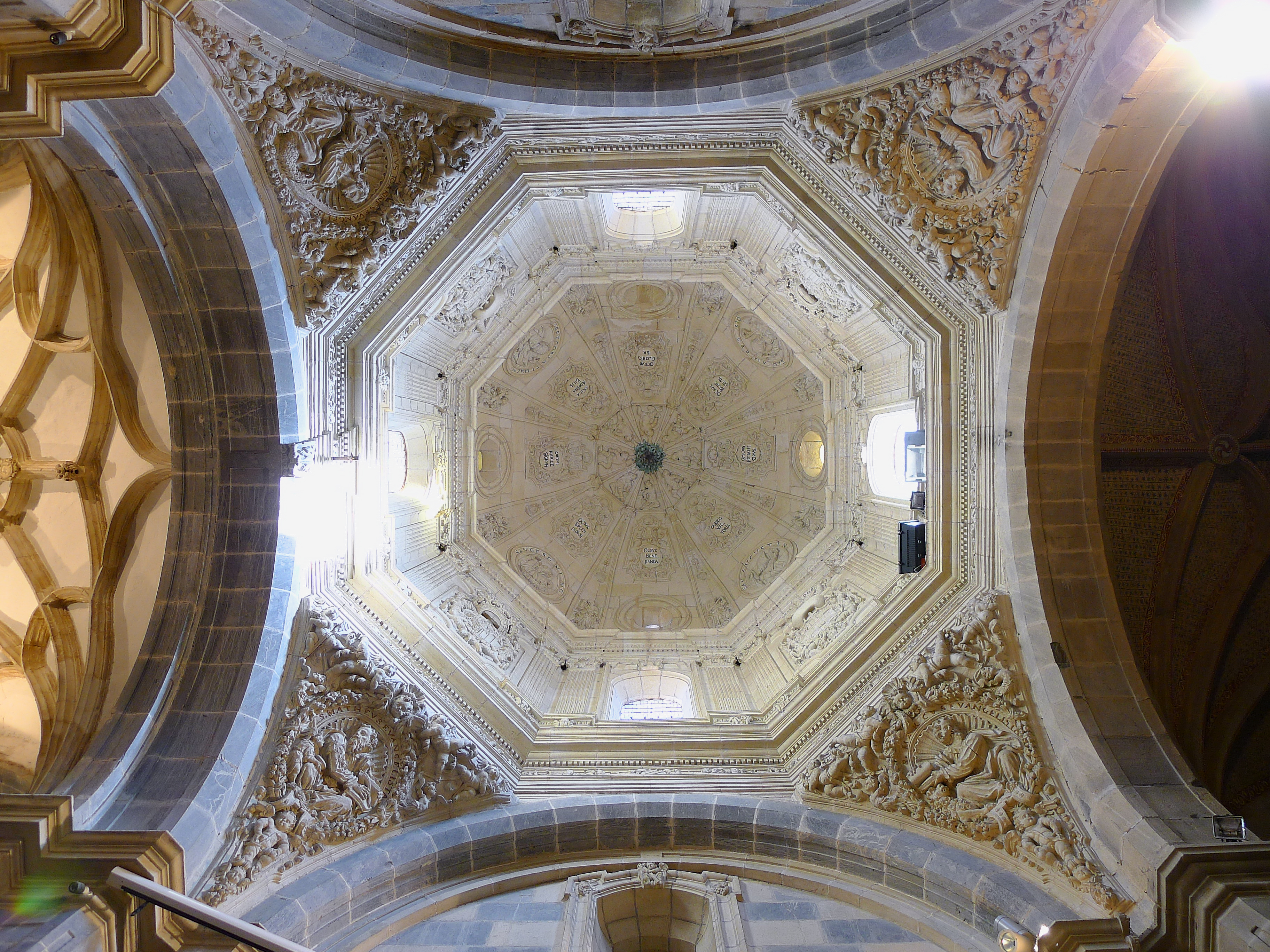 Magnífica bóveda barroca, catalogada como obra cumbre del barroco cántabro (1713-1719). Mandada a construir por el arzobispo Francisco Gómez de Otero y Cossío. El proyecto es del benedictino fray Pedro Martínez de Cardeña, con la posible intervención de un tal maestro Plaza y la escultura de Antonio de Borja y Zayas (1661-1730)